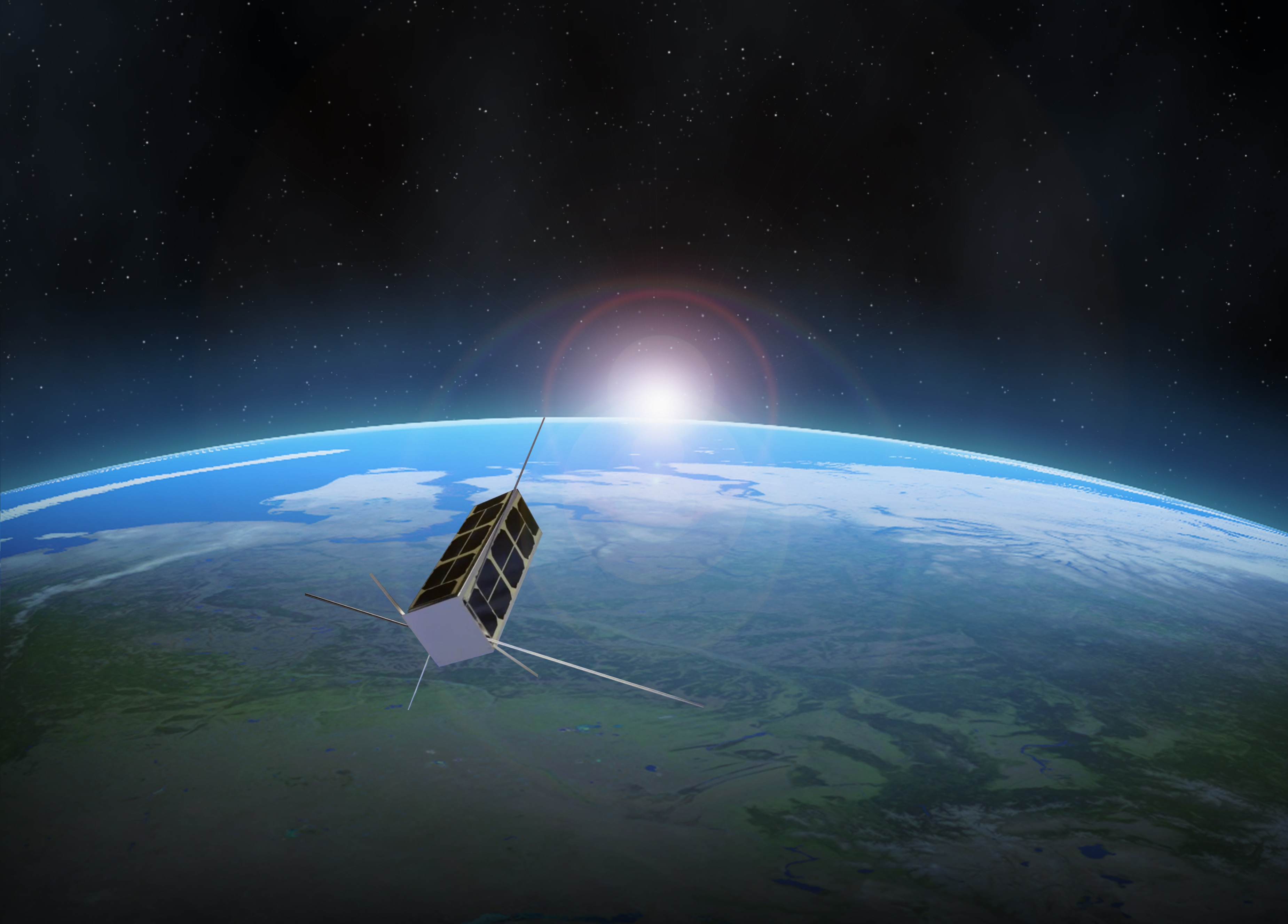 Representación artística del satélite AntelSat en órbita terrestre